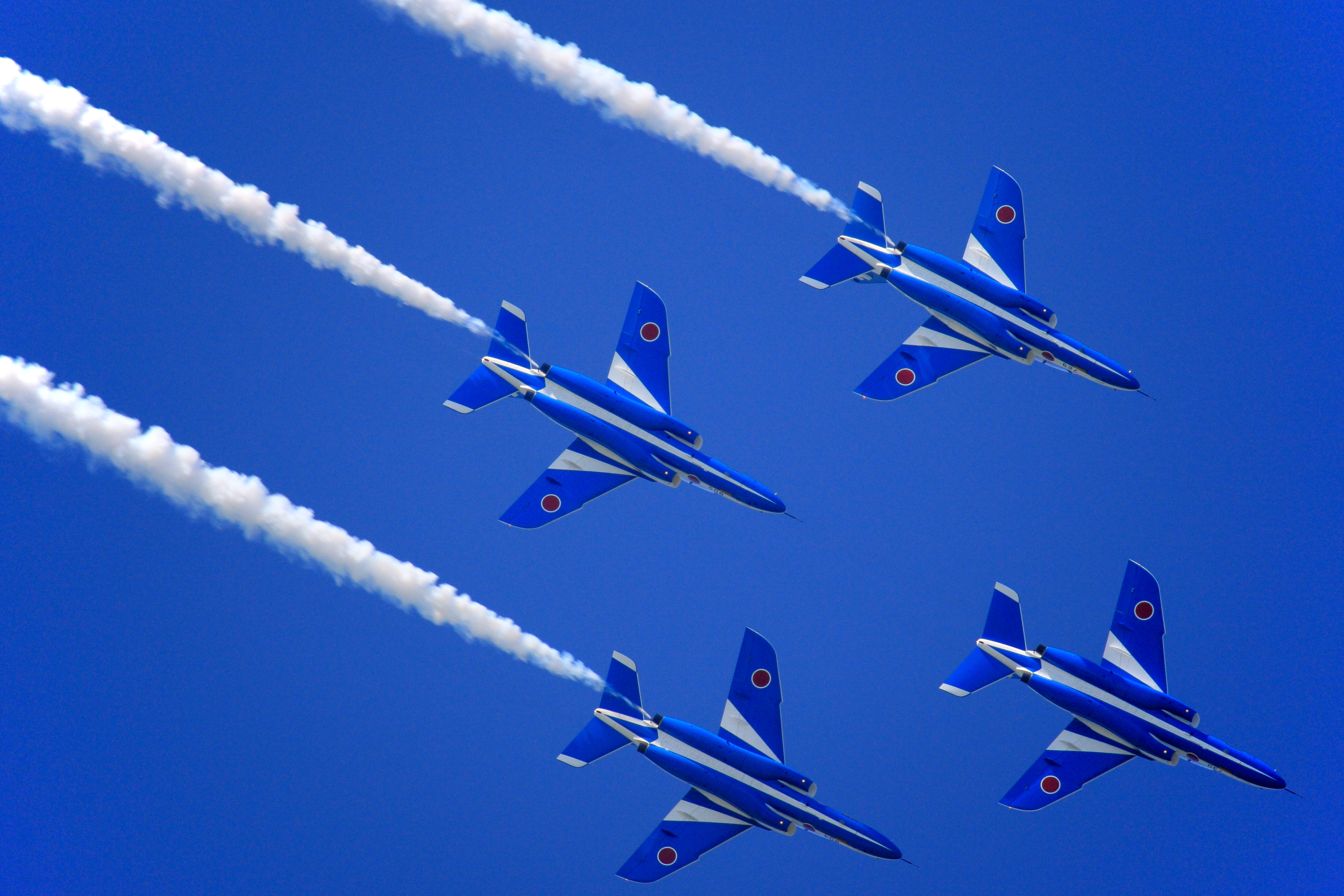 航空自衛隊松島基地 第11飛行隊ブルーインパルスのT-4 練習機による、ダイヤモンド・ロール